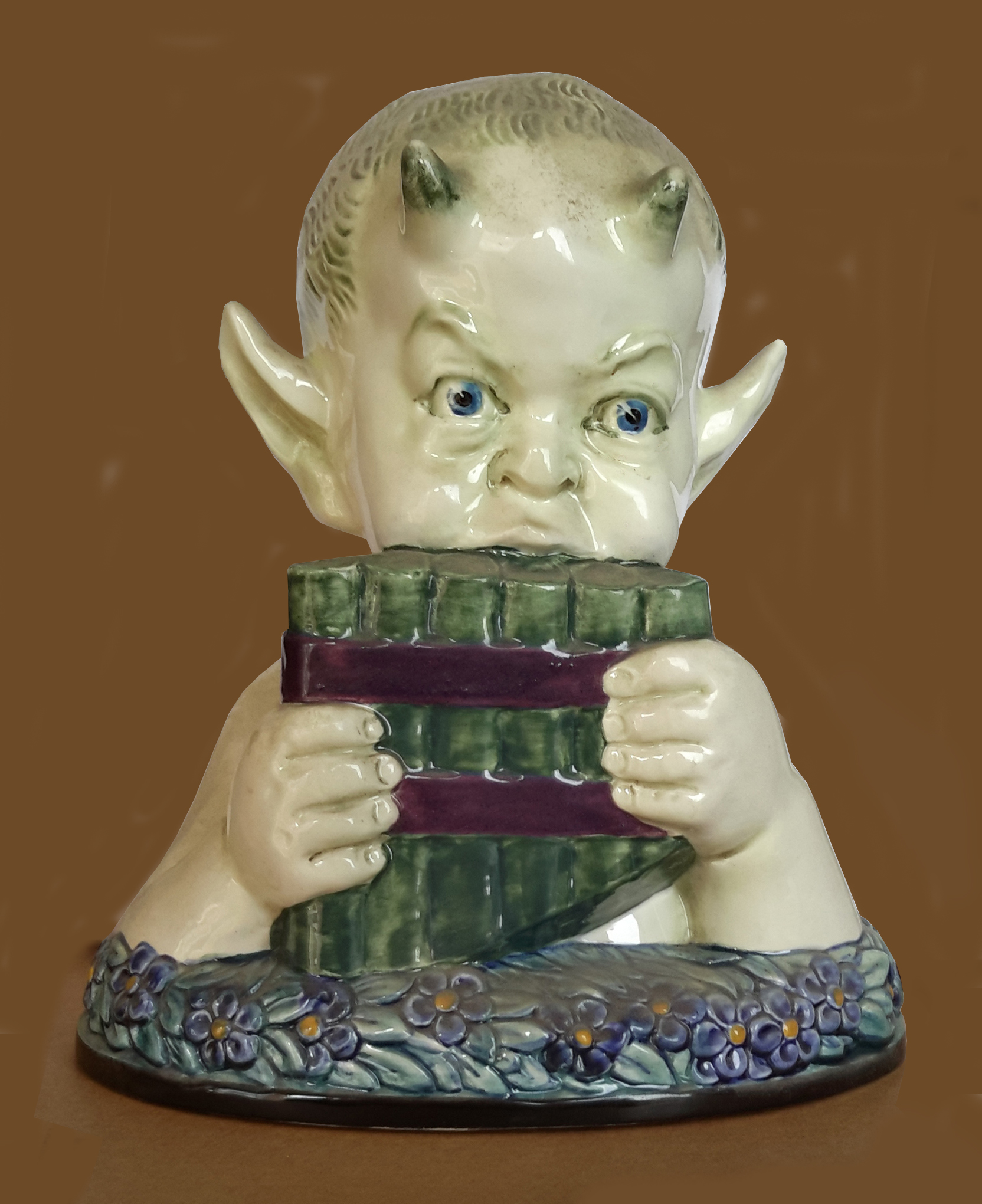 Faun mit Flöte, Entwurf August Schädler für die Großherzogliche Majolikamanufaktur Karlsruhe